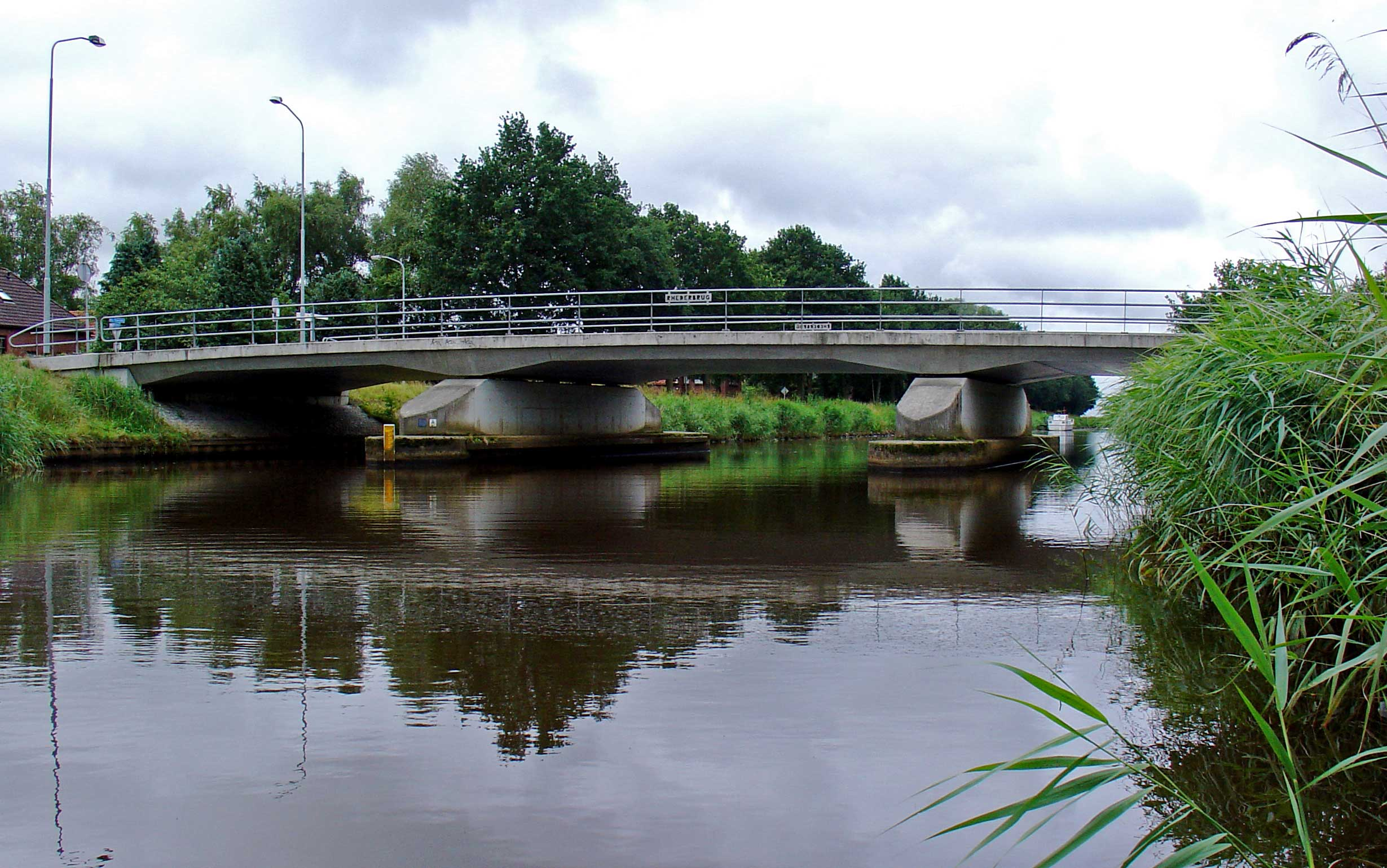 Rhederbrug over het B.L. Tijdenskanaal bij Rhederbrug